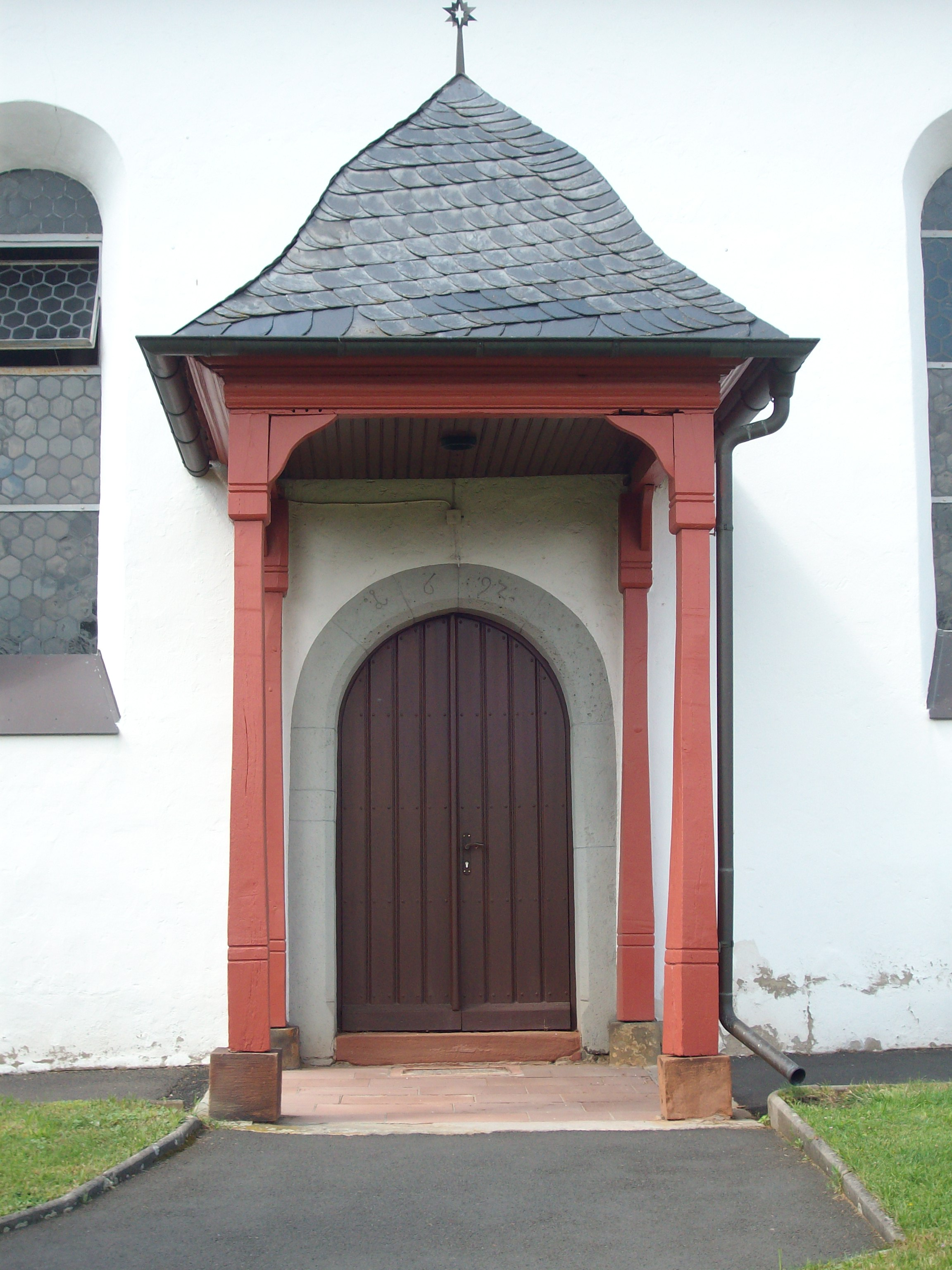 Südportal der Kirche in Lich-Eberstadt, Hessen